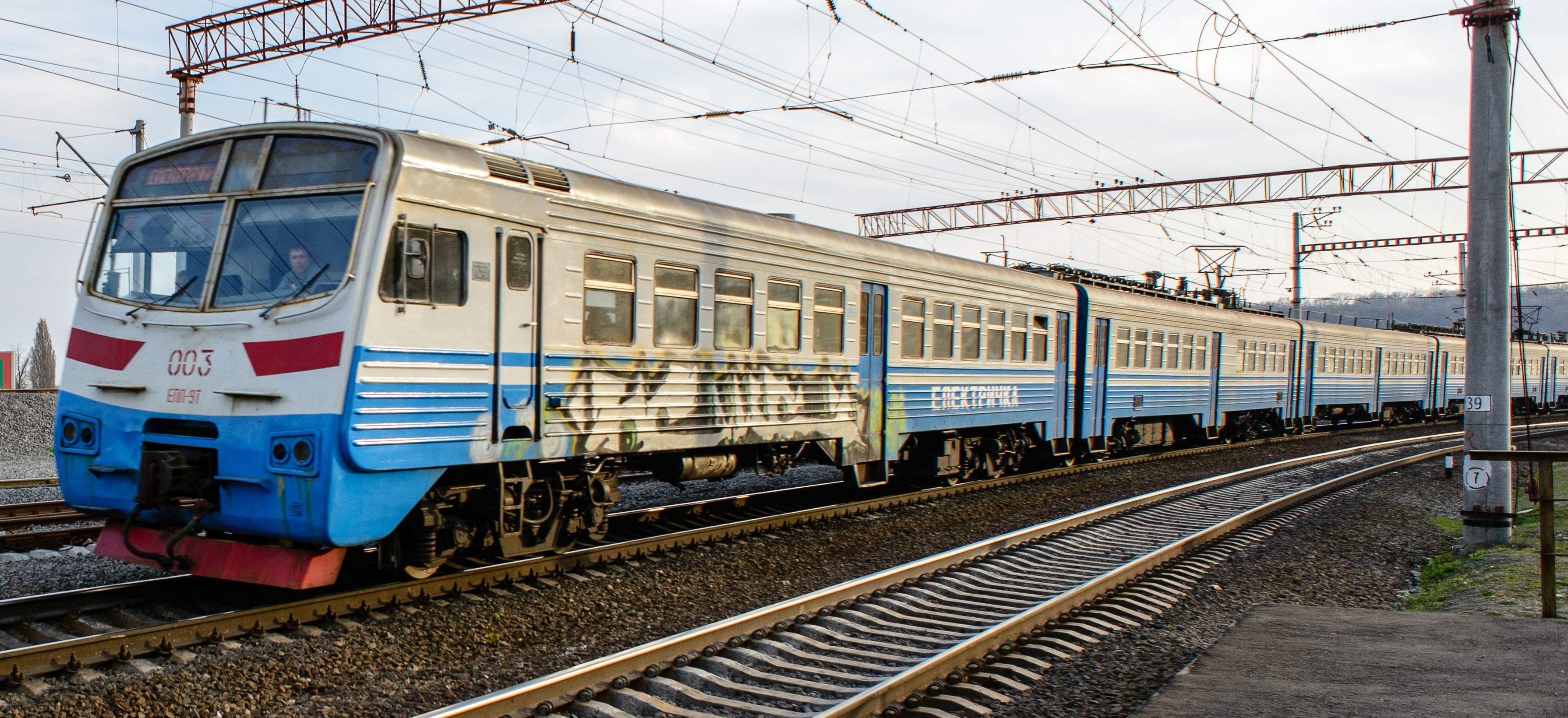 Электропоезд ЭПЛ9Т-003 в Киеве на городском маршруте